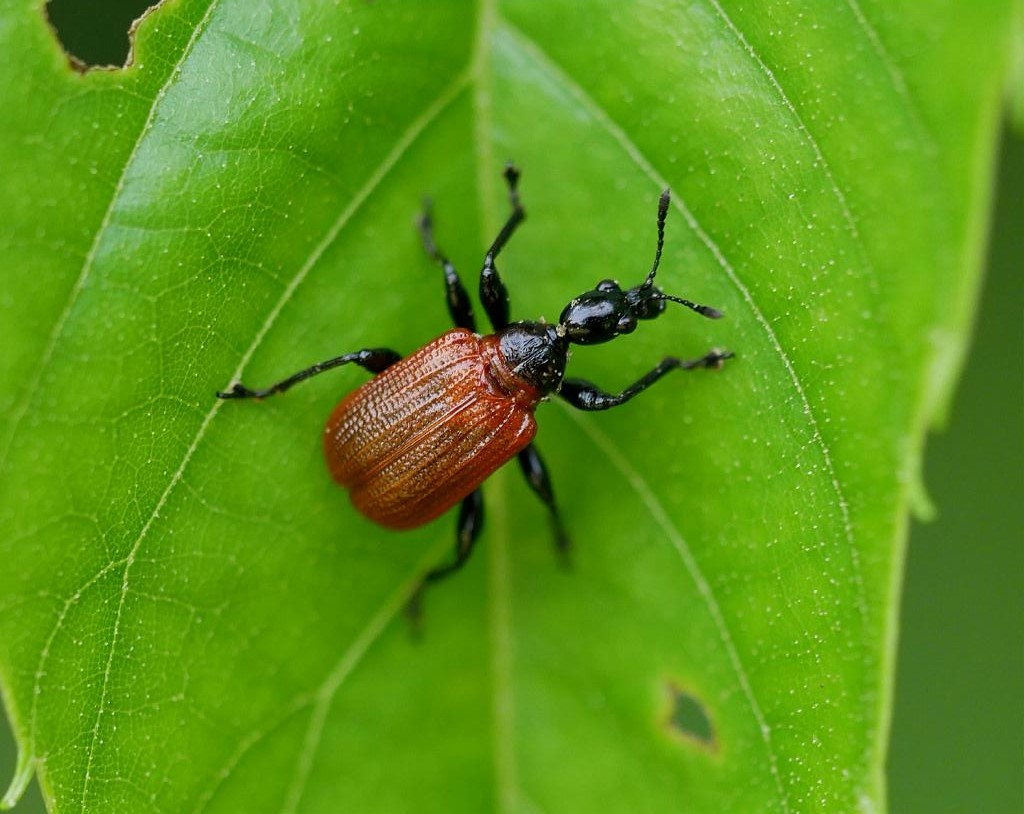 2019/06/03 和歌山県田辺市：Tanabe City. Wakayama Pref. Japan